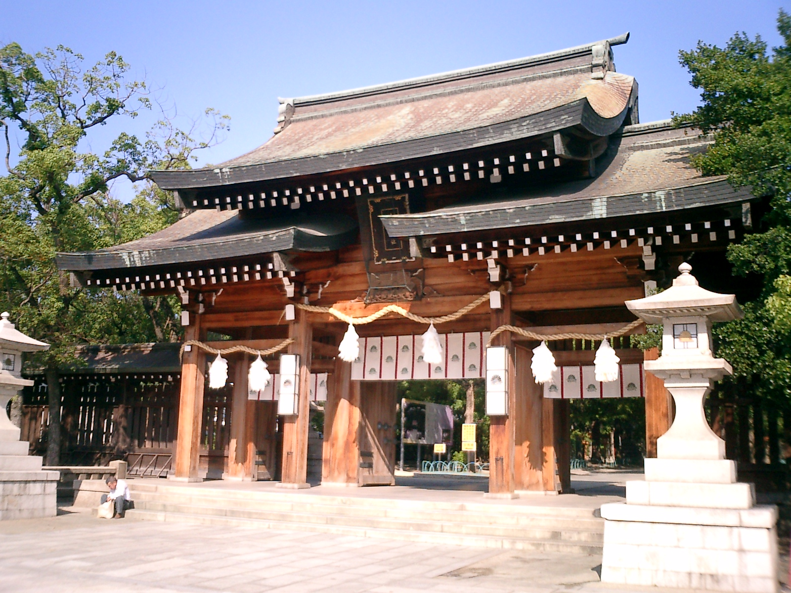 Minatogawa_Jinja_main_gate